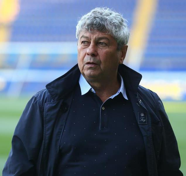 Мірча Пуческу під час роботи з Шахтарем